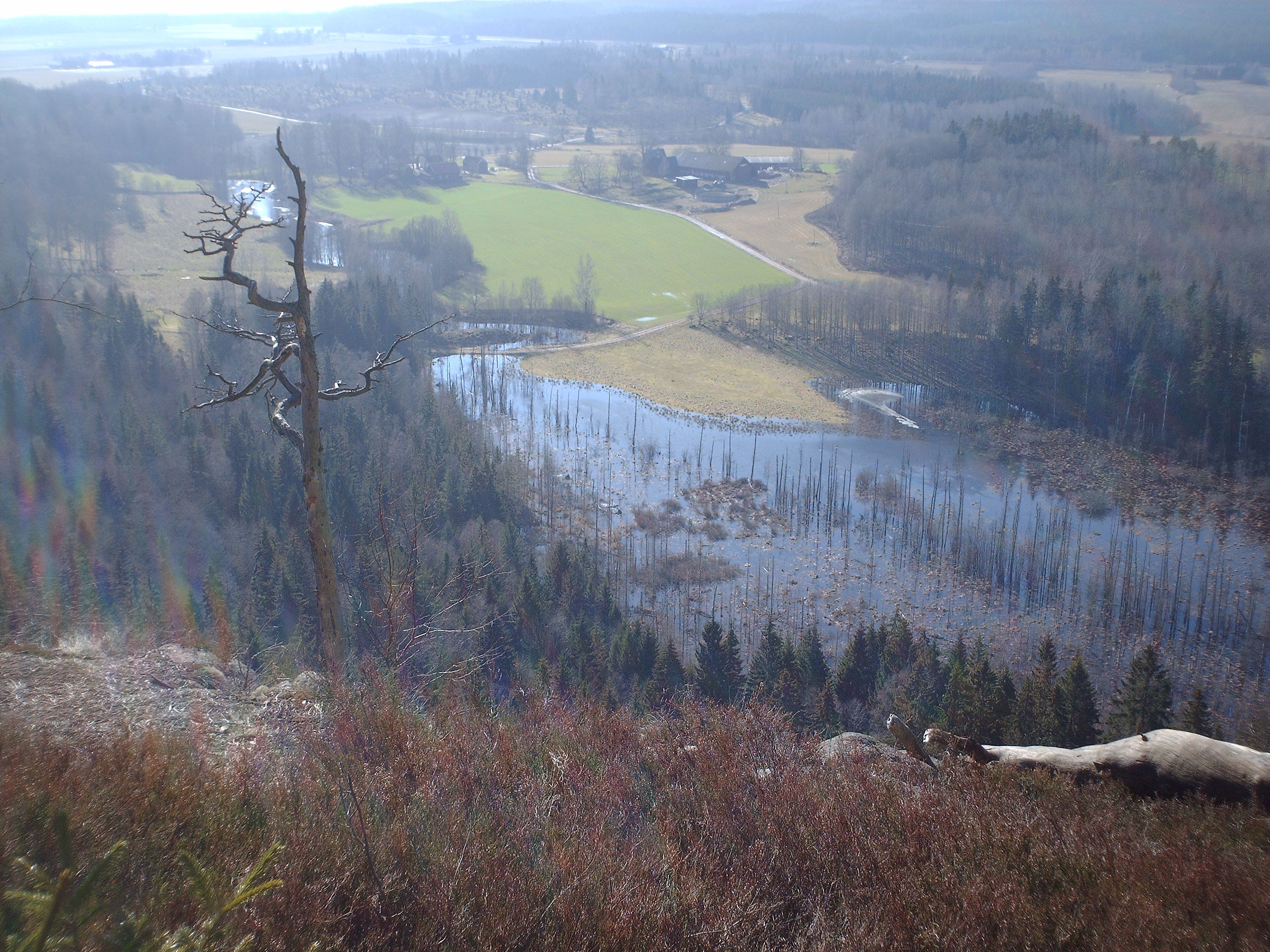 Håleberget, Motala, Sweden.